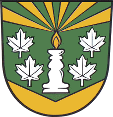 Wappen der Gemeinde Lichte (Thüringen) Gestaltung: Halbrunder Schild (spanische/portugiesische/flämische Form): Wappen-Ort: Grundfarbe grün – in Anlehnung an die Lage von Lichte, in Thüringen, dem „grünen Herzen Deutschlands“. Schildfuß: goldener Kompakt-Keil, Keilspitze Mitte Schildfuß – Symbol für das bis 100 m tiefe Lichtetel, wobei goldfarben für klare Wasser von Lichte-Fluss und Kleiner-Lichte stehen, die letztlich Namensgeber der Gesamtansiedlung wurden. Wappenfigur: Hauptmotiv, weißer Leuchter feinem Porzellans mit goldener Flamme – Symbol für jahrhundertelange Tradition der Manufaktur feinem Porzellans im Tal von Piesau-Fluss und Lichte-Fluss. Wappen-Ort: Wappenfigur/ Hauptmotiv (Leuchter), flankiert von vier Weiß-Porzellan-Ahornblättern – Symbol sowohl für die vier Ortsteile Oberlichte (mit Ascherbach, Waschdorf, Dorst und Hügel), Wallendorf (mit Lamprecht), Geiersthal sowie Bock-und-Teich, als auch and Teilhabe and Herstellung und Veredlung feinem Porzellans. Schildhaupt: von goldener Flamme (Leuchter) ständerförmig ausgehende Strahlen im Schildhaupt – Symbol für Weltoffenheit und Export feinem Porzellans in alle Welt. Künstler-Entwurf: Dekorgestalter G. Nussmann (Steinheid TH), Bildhauer G. Stör (Geiersthat (Lichte TH)) 1995, nach historischer Siegelmarke (4x4 cm) der Gemeinde Lichte, bei Wallendorf in Thüringen (1850-1923); Genehmigung Landesverwaltungsamt TH, 15. Juli 1995.